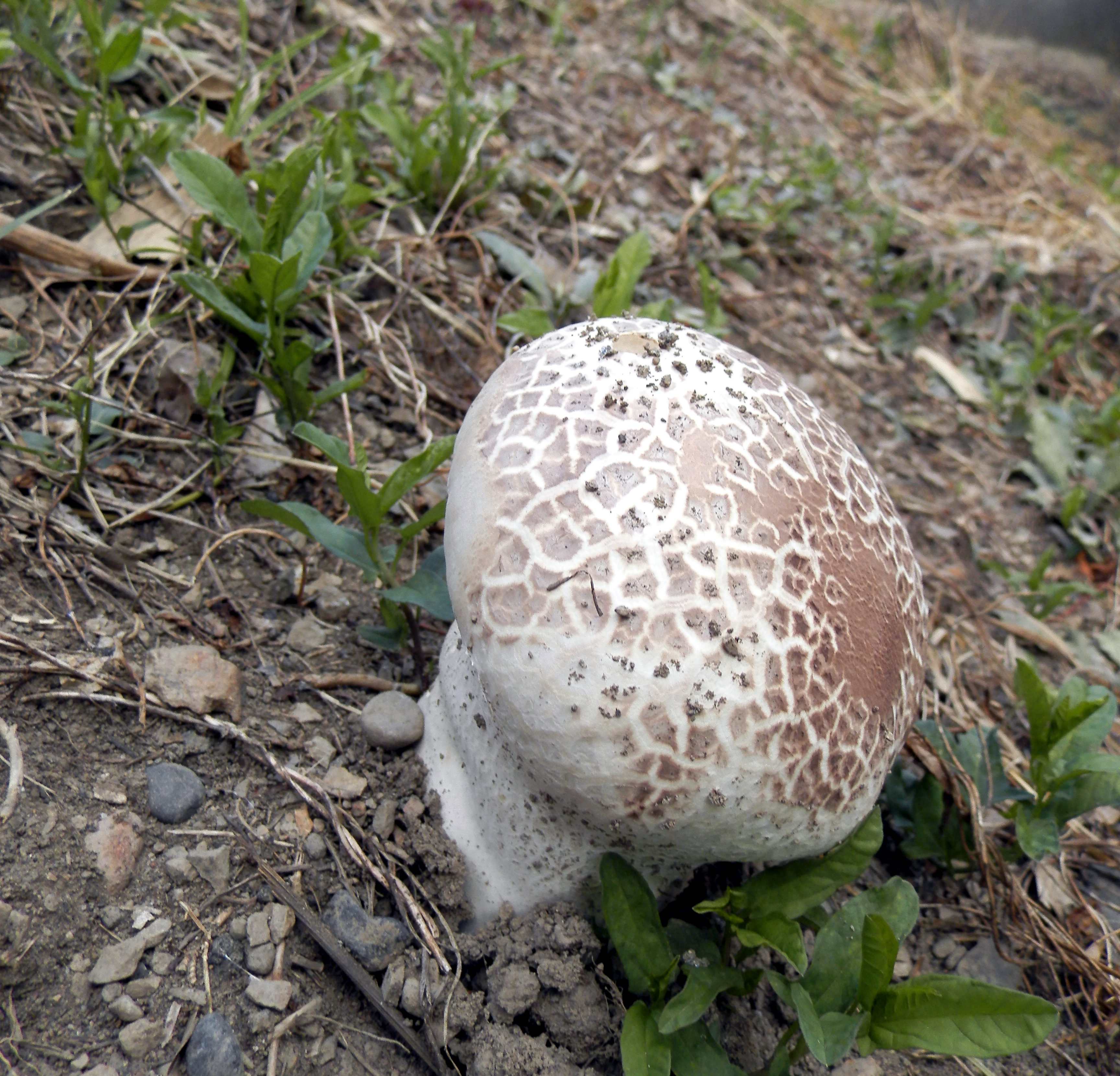 オニフスベ